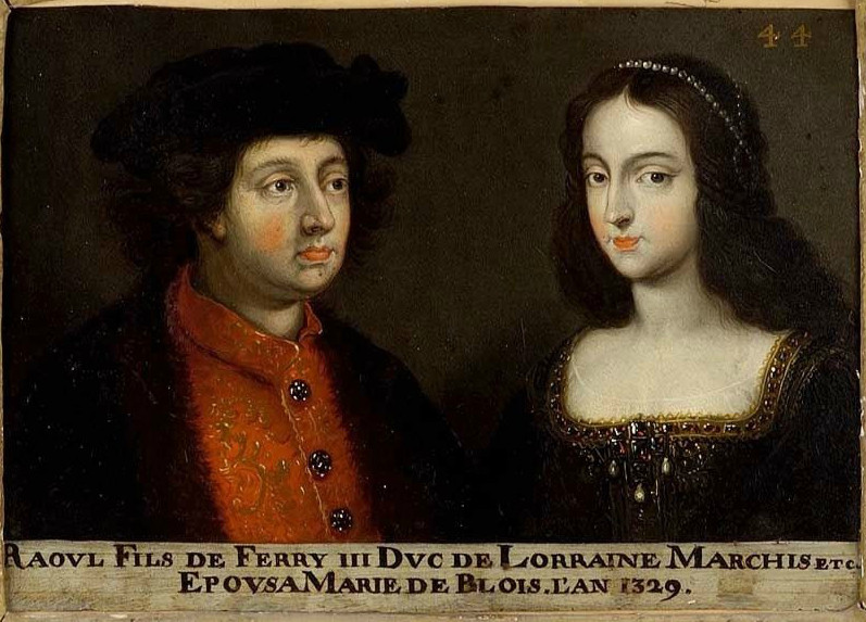 Portrait de Raoul, duc de Lorraine de 1328 à 1346, et de son épouse Marie de Blois. Ce tableau fait partie d'une suite d'une soixantaine de double-portraits représentant les ducs et duchesses de Lorraine ainsi que leurs ancêtres supposés. Musée des Offices, Florence (Inv. 1890, 620)